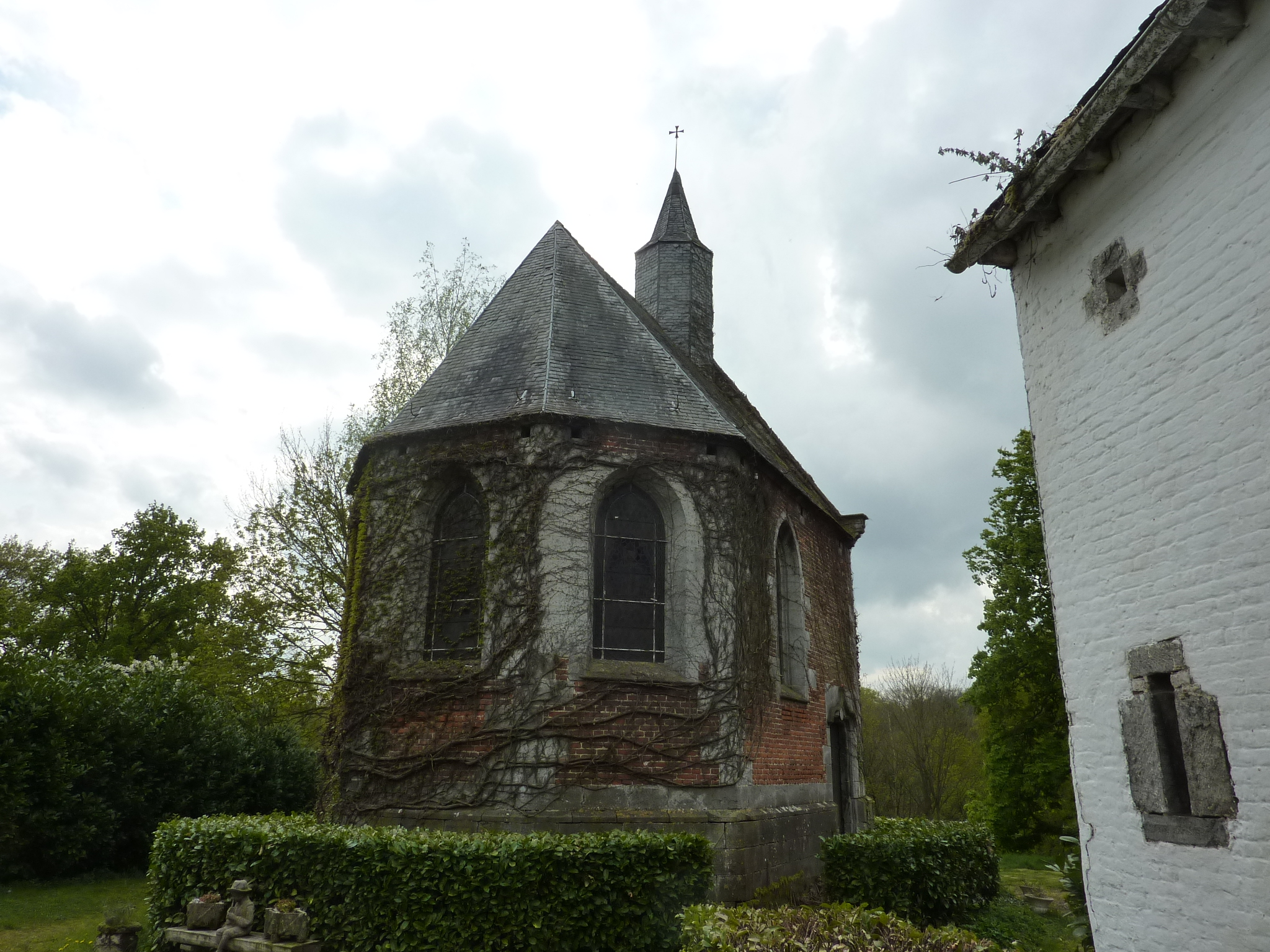 Commanderie de la Neuve-Court (Wavre)